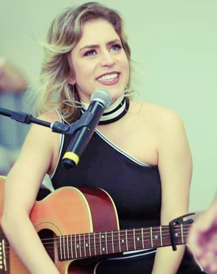 Lu no Meet and Greet, em Fortaleza.